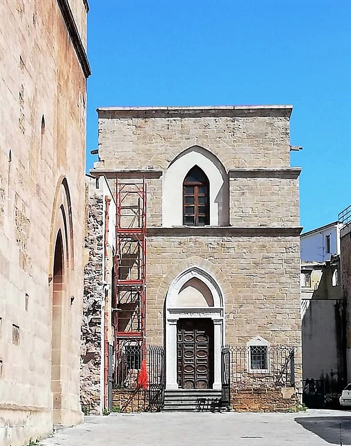 Chiesa di Sant'Antonio Abate presso Palazzo Chiaramonte - Steri.